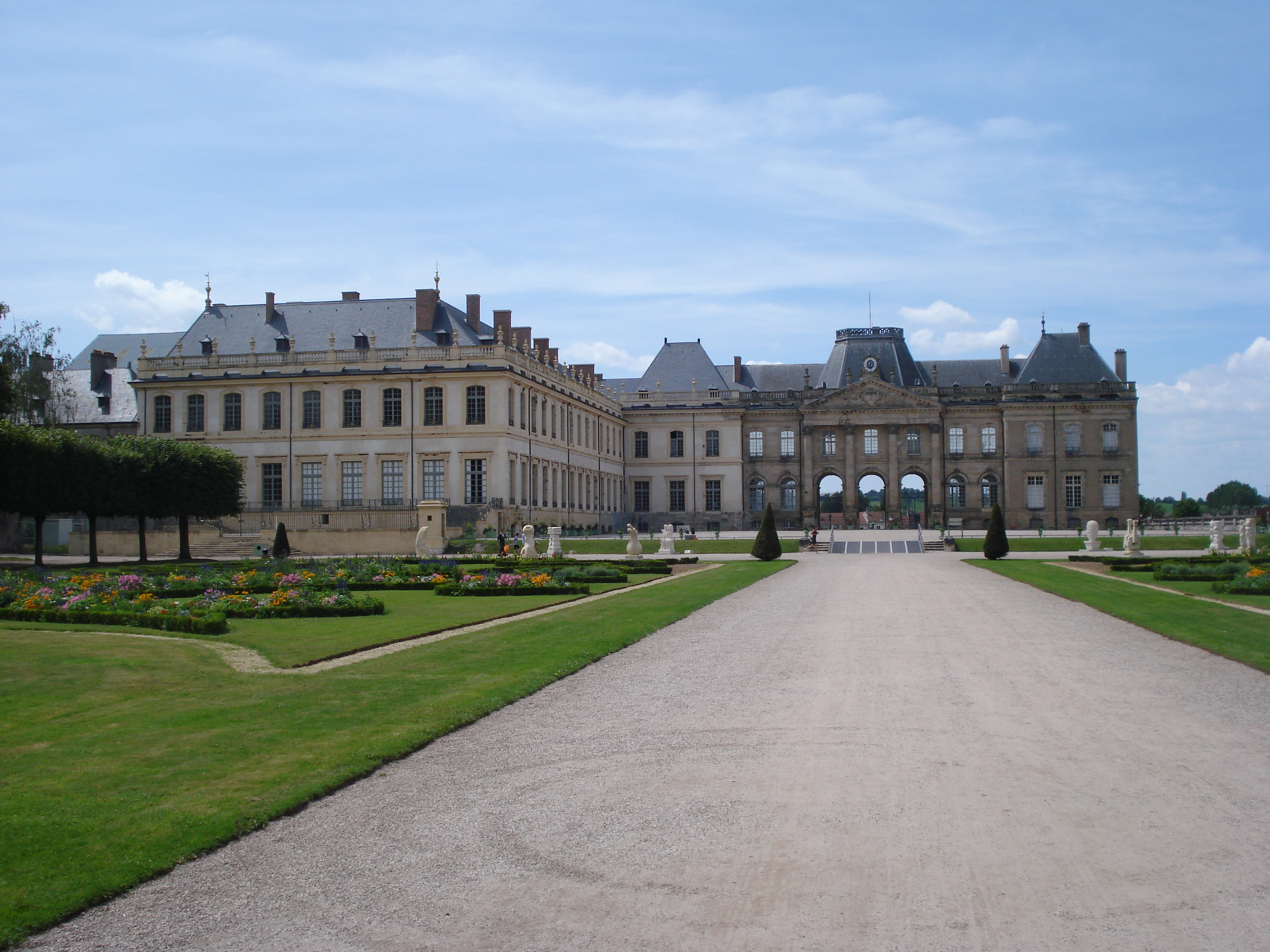 Château de Lunéville depuis les bosquets